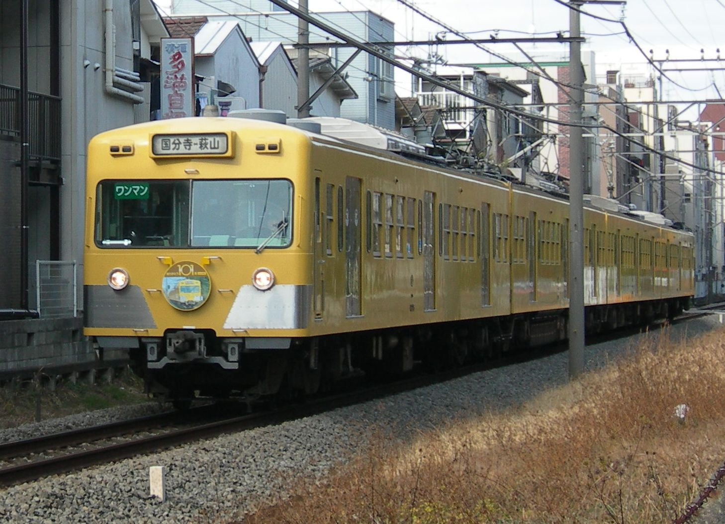 西武101系電車225F